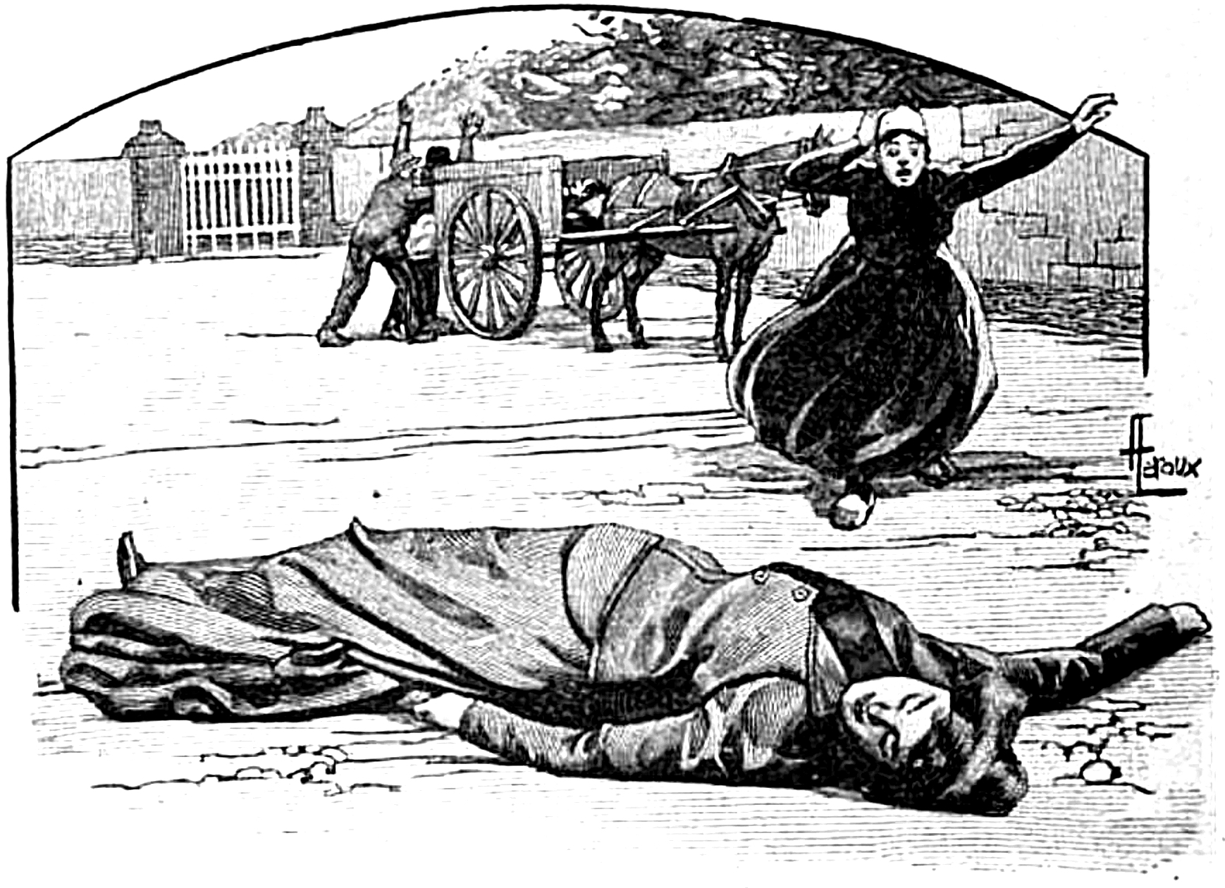 Guy de Maupassant's Une Vie